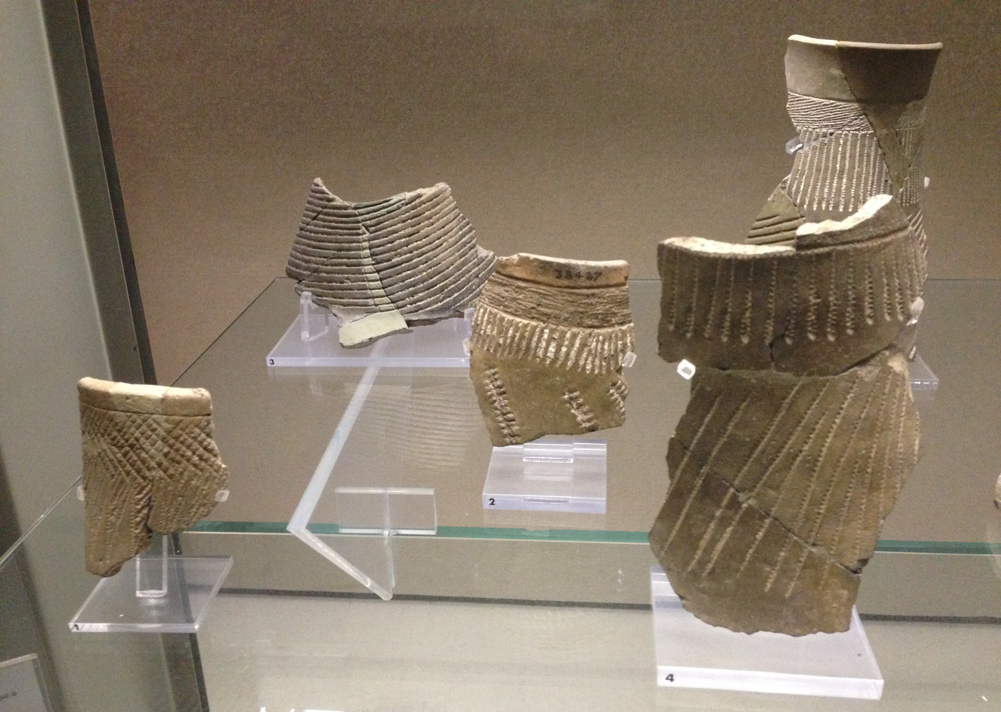 Frammenti di fiasco Stentinello. Neolitico medio. Cultura di Stentinello fine VI prima metà V millennio a.C.